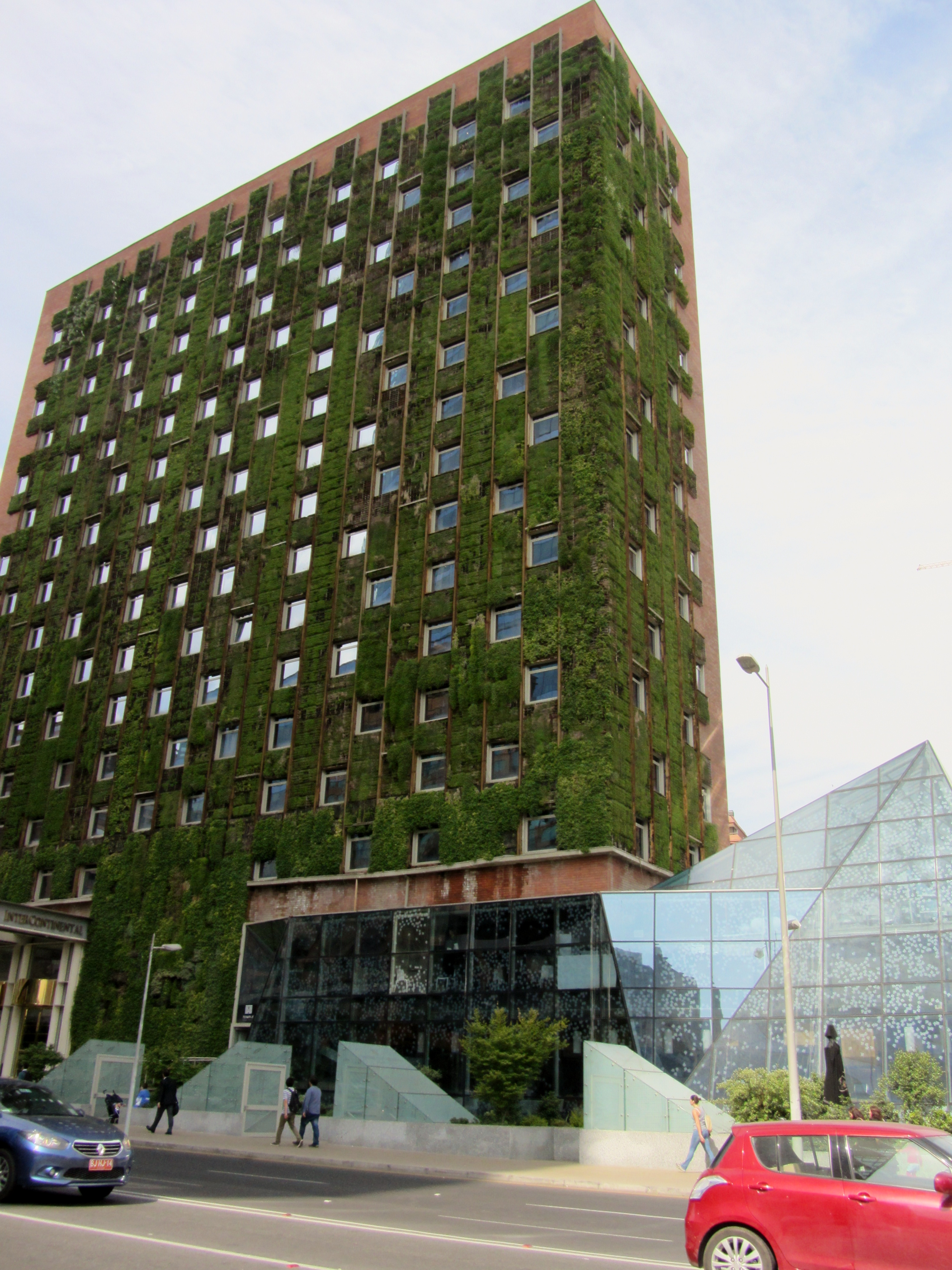 Hotel Intercontinental en avenida Vitacura 2885, esquina Isidora Goyenechea